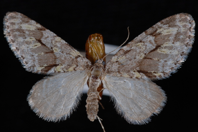 Cladara limitaria